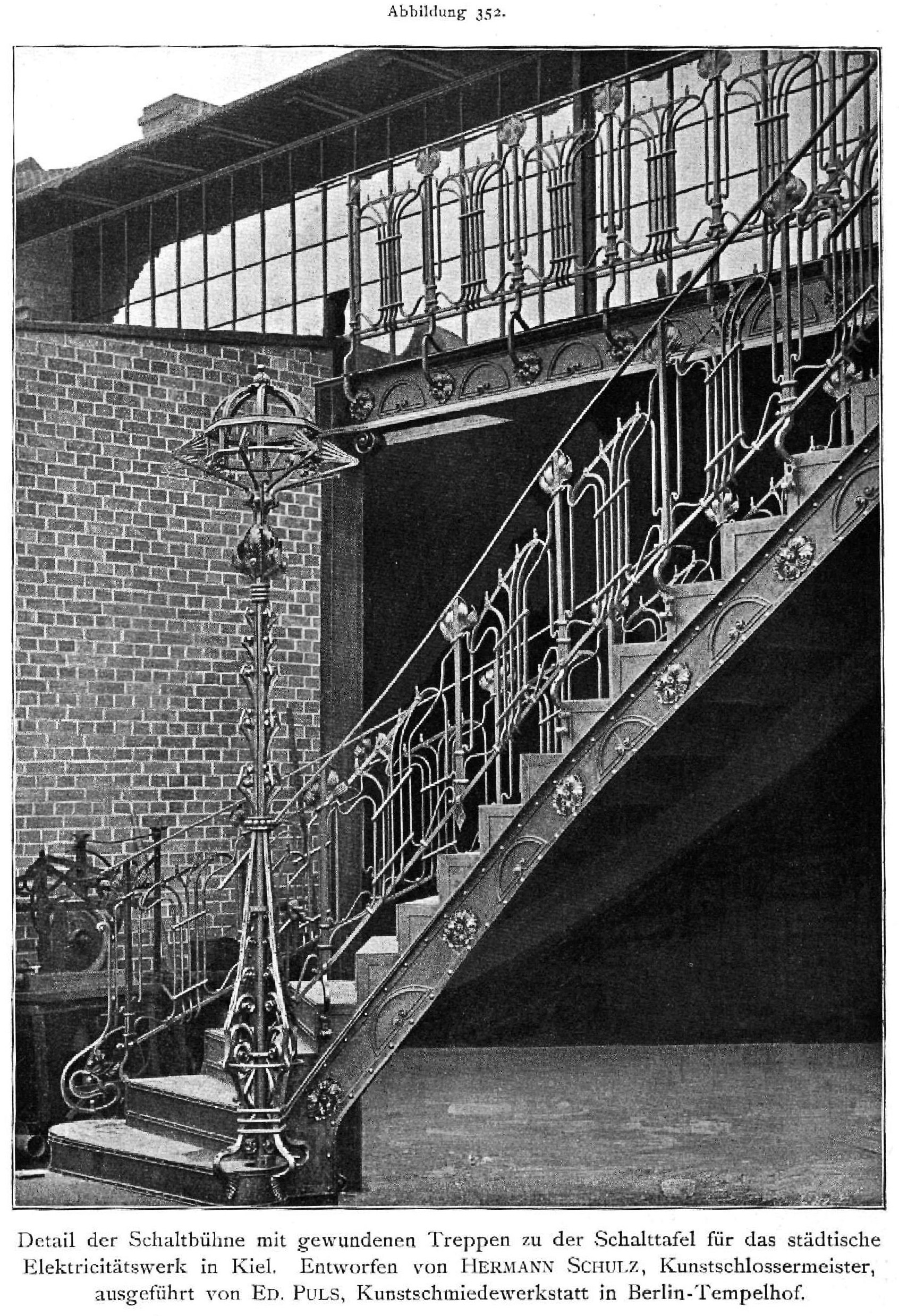 Schmiedeeiserne Treppe zur Schaltbühne für das Städtische Elektrizitätswerk in Kiel, ausgeführt von der Kunstschmiedewerkstatt Eduard Puls